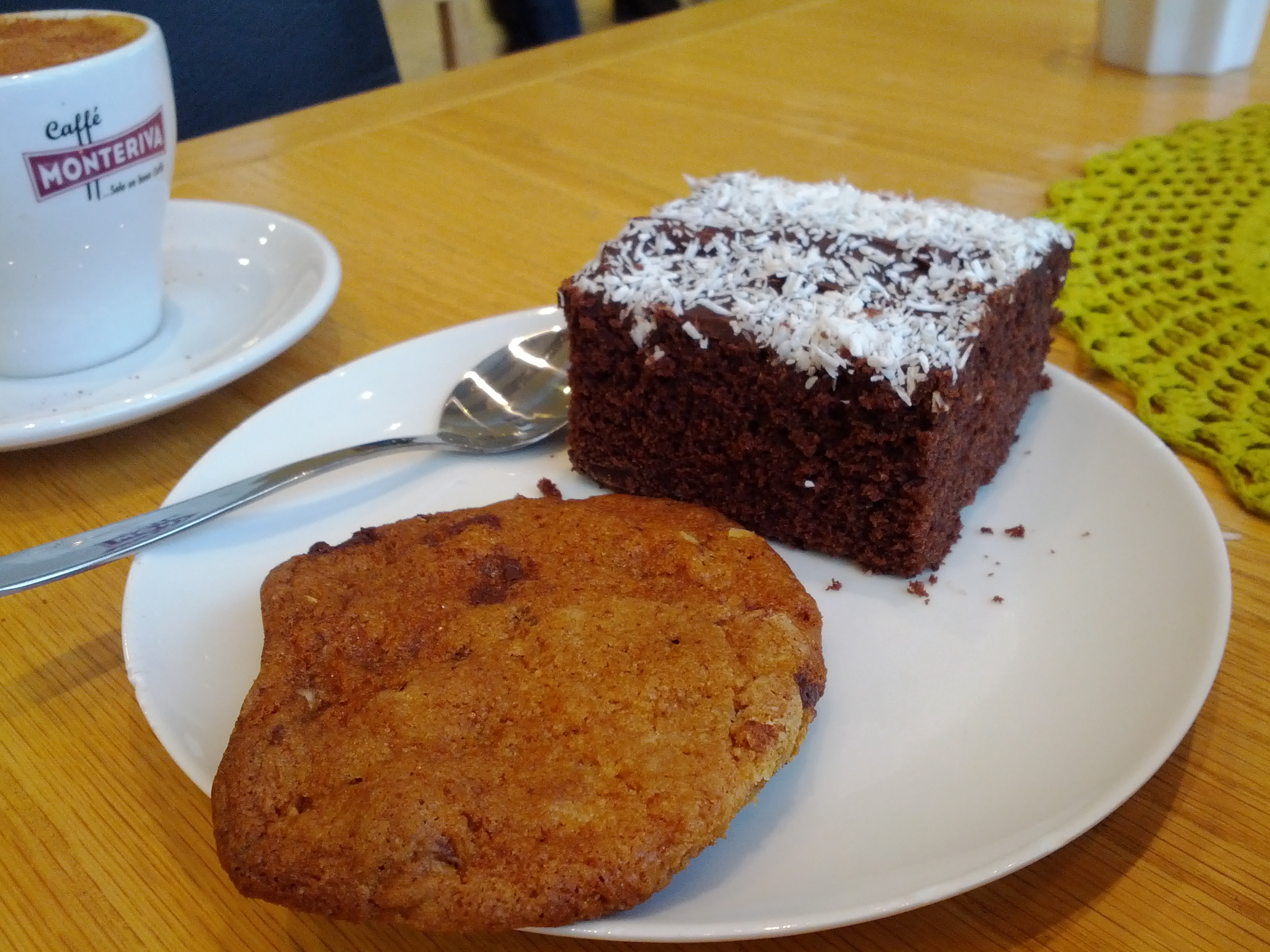 En kaka och en kärleksmums/mockaruta/chokladruta.